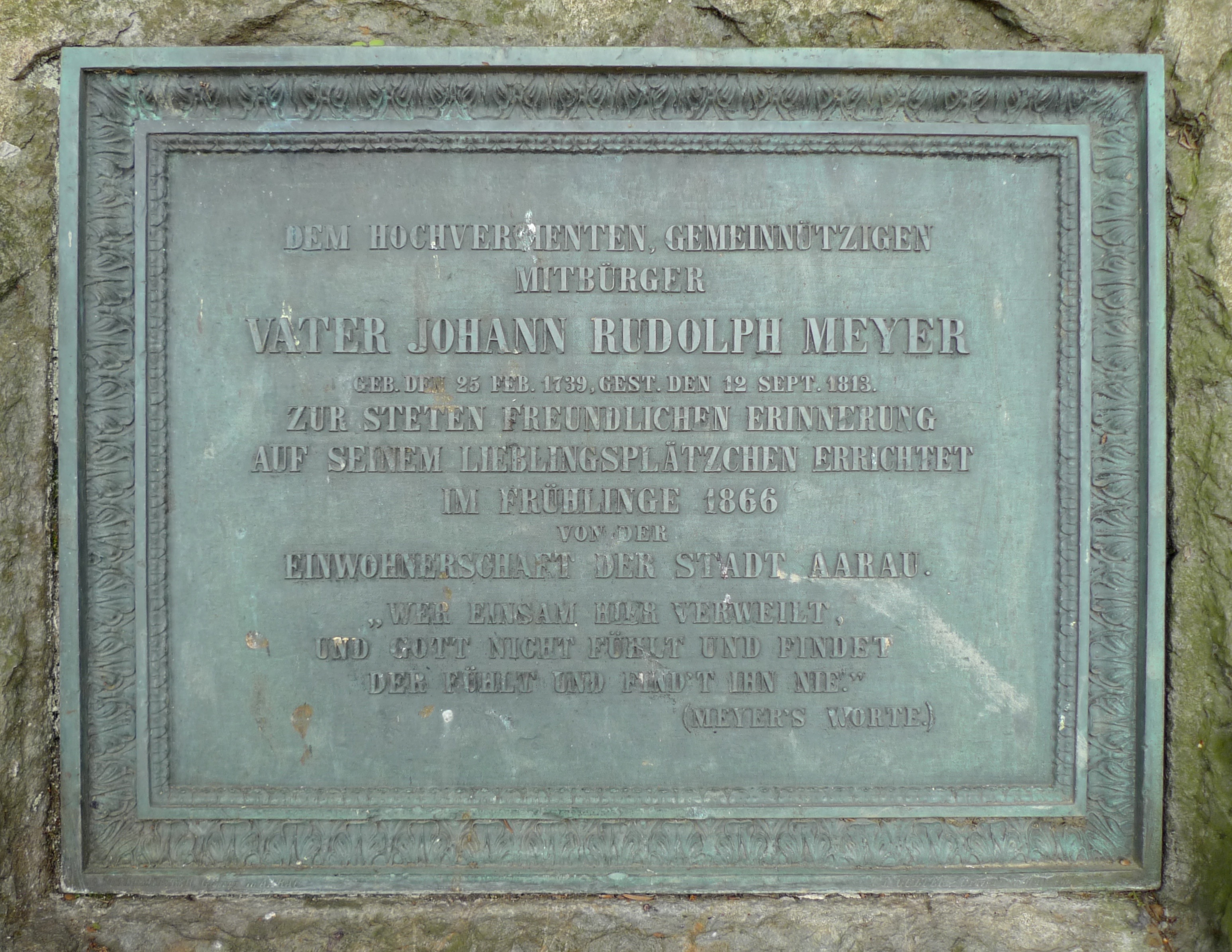 Gedenkstein für Johann Rudolf Meyer (1739–1813) am Hungerberg bei Aarau mit deistisch gefärbtem Zitat, 1866.